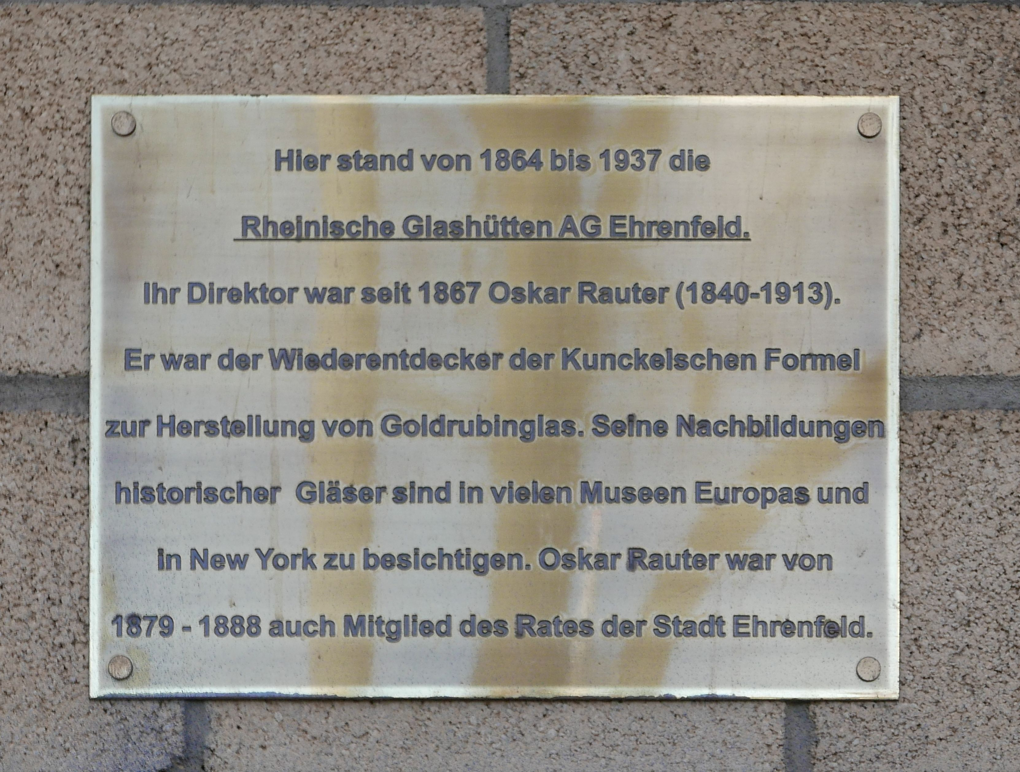 Gedenktafel Rheinische Glashütten Actiengesellschaft am Postamt am Ehrenfeldgürtel 125